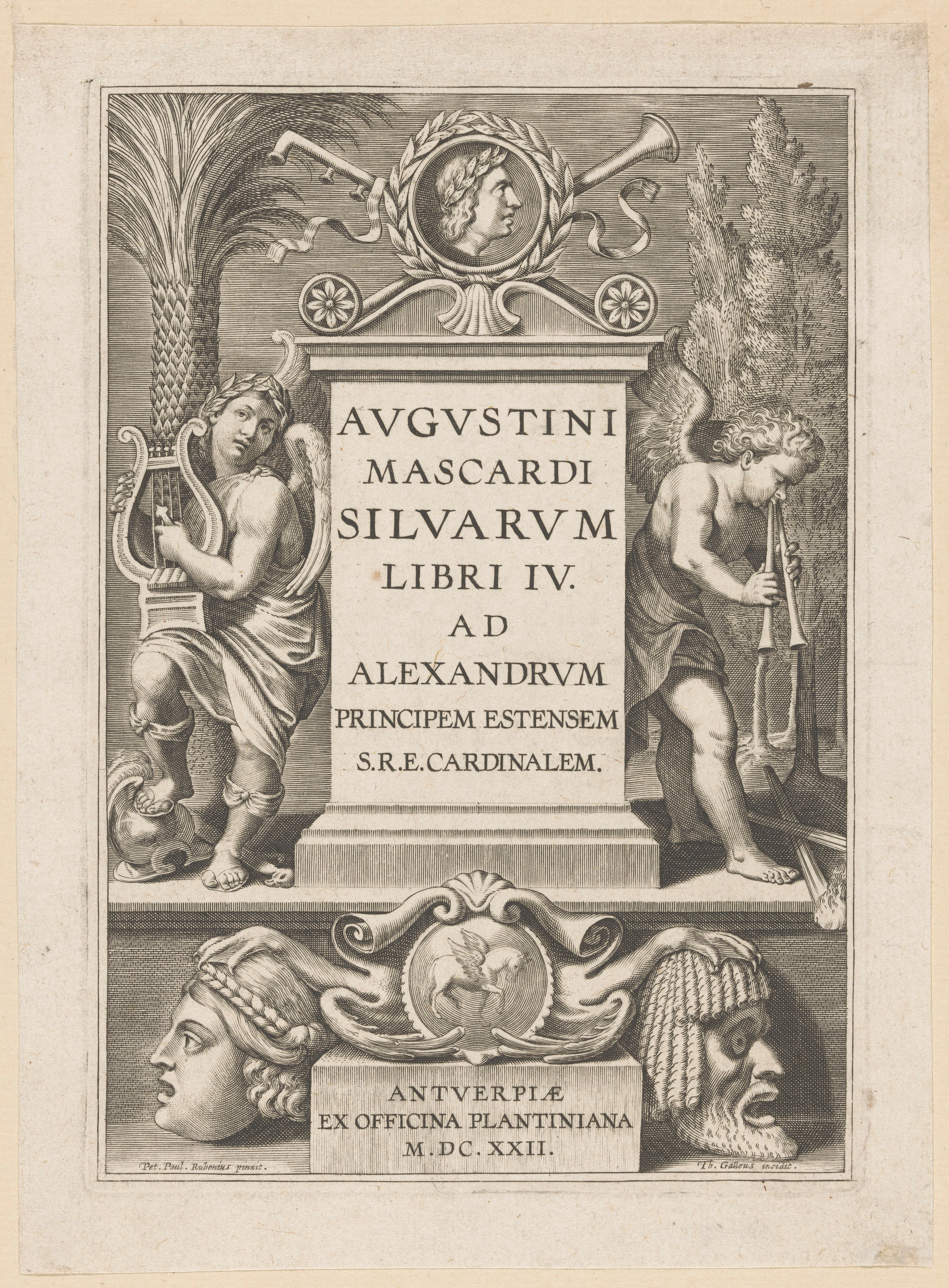 IdentificatieTitel(s): Allegorische titelpagina met portretmedaillon van VergiliusTitelpagina voor: A. Mascardi, Silvarium libri IV. Antwerpen, 1622Objecttype: prent titelpagina Objectnummer: RP-P-OB-6950Catalogusreferentie: Judson&van de Velde 48-1(3)Opschriften / Merken: verzamelaarsmerk, verso, gestempeld: Lugt 240Omschrijving: Op een stenen plaat rust een portretmedaillon van Vergilius. Aan weerszijden van de steen twee geni met lier en dubbelfluit. De twee staan symbool voor de poezië. Onder de steen een cartouche met een pegasus en ernaast twee maskers, wellicht een verwijzing naar de achternaam van de auteur.VervaardigingVervaardiger: prentmaker: Theodoor Galle (vermeld op object)naar schilderij van: Peter Paul Rubens (vermeld op object)uitgever: Officina Plantiniana (vermeld op object)Plaats vervaardiging: AntwerpenDatering: 1622Fysieke kenmerken: gravureMateriaal: papier Techniek: graveren (drukprocedé)Afmetingen: plaatrand: h 192 mm × b 133 mmToelichtingTitelpagina voor: A. Mascardi, Silvarium libri IV. Antwerpen, ex officina Plantiniana, 1622.OnderwerpWat: Genii (Roman tutelary spirits); 'Genio' (Ripa)symbolic representations, allegories and emblems ~ poetry; 'Poesia' (Ripa)mask, mascaron ~ ornamentPegasus, the winged horseWie: Publius Vergilius MaroVerwerving en rechtenVerwerving: overdracht van beheer 1816Copyright: Publiek domein